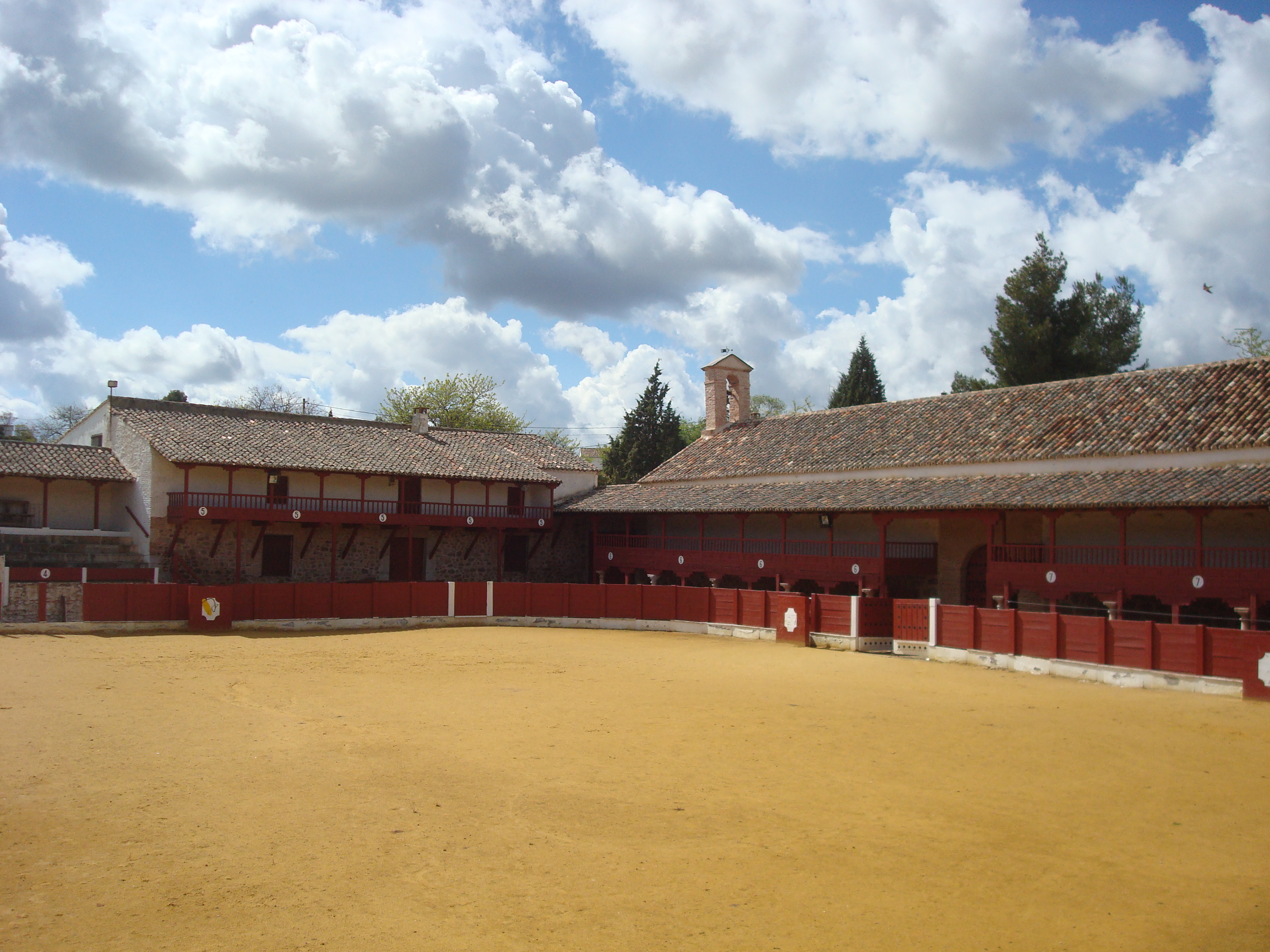 Santa Cruz de Mudela, Spain.